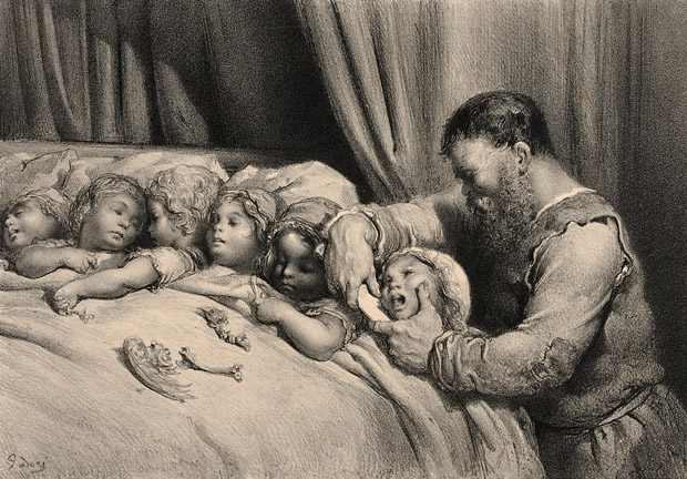 Gustave Doré (1832-1883), « L’Ogre », dans Le Petit Poucet, 1869. MAMCS, Cabinet d’Art Graphique